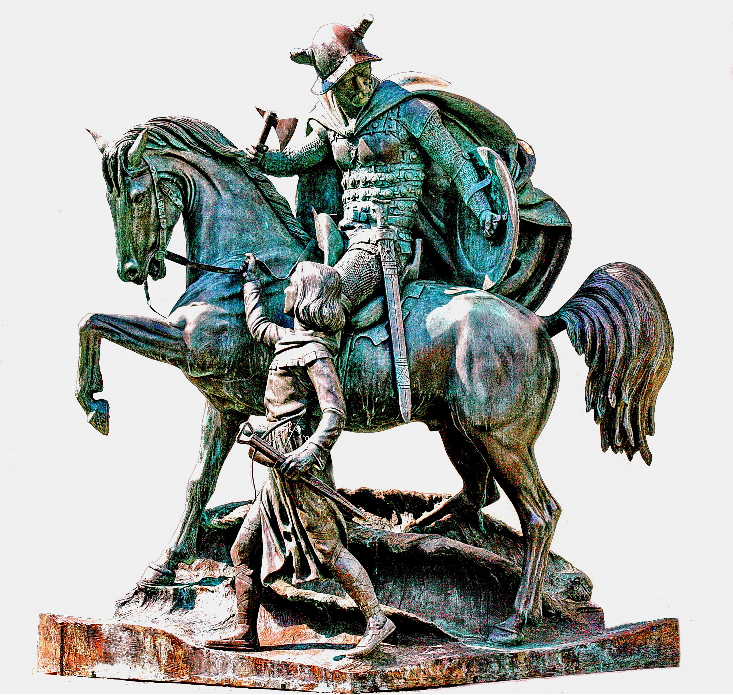 Der Ritter von Elberfeld,Wuppertal,2010,Bronze Sculuptore